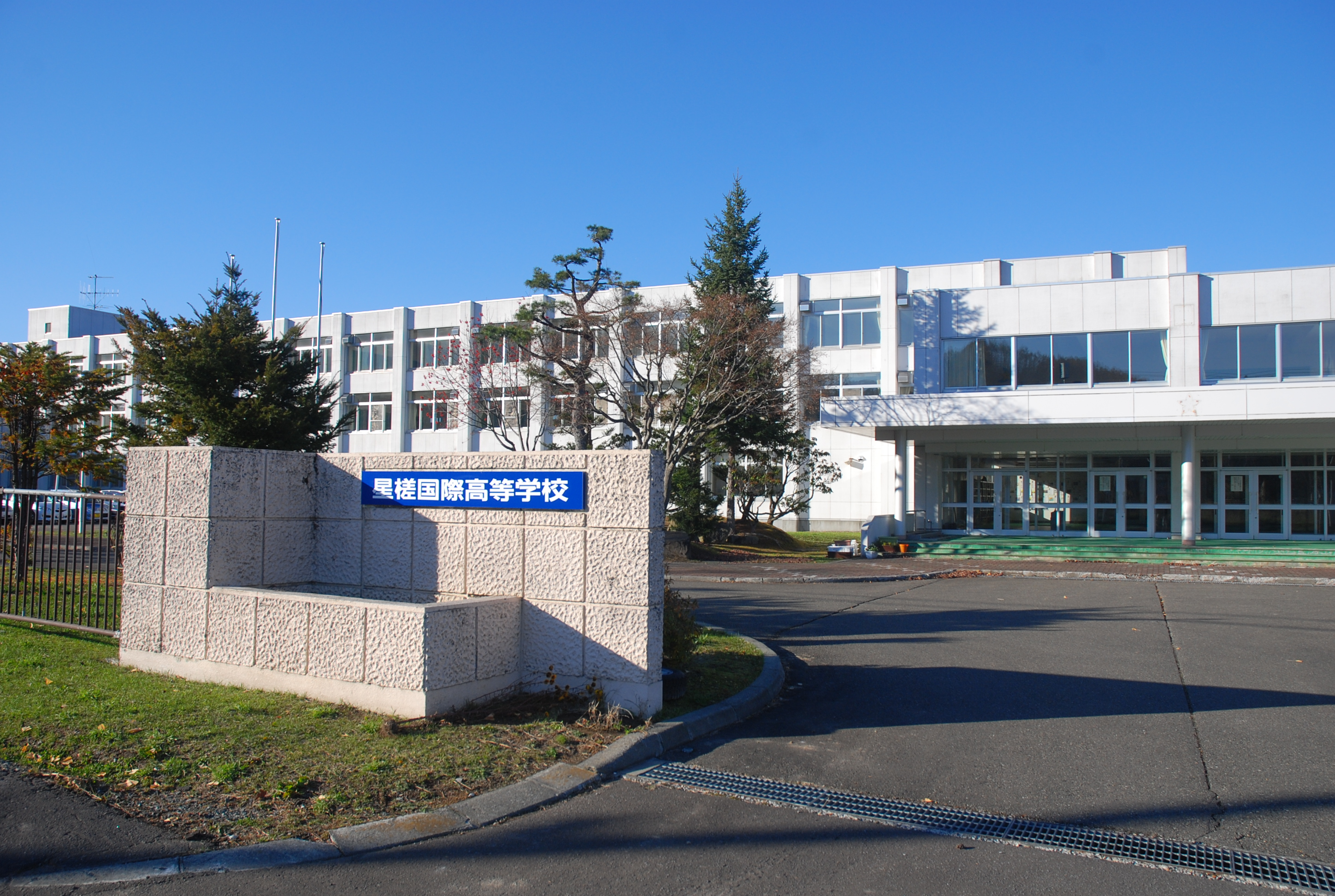 北海道芦別市にある校舎